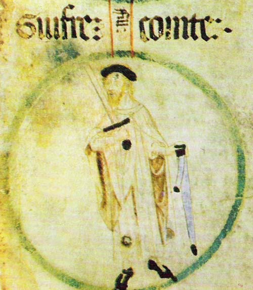 Rotlle genealògic del Monestir de Poblet